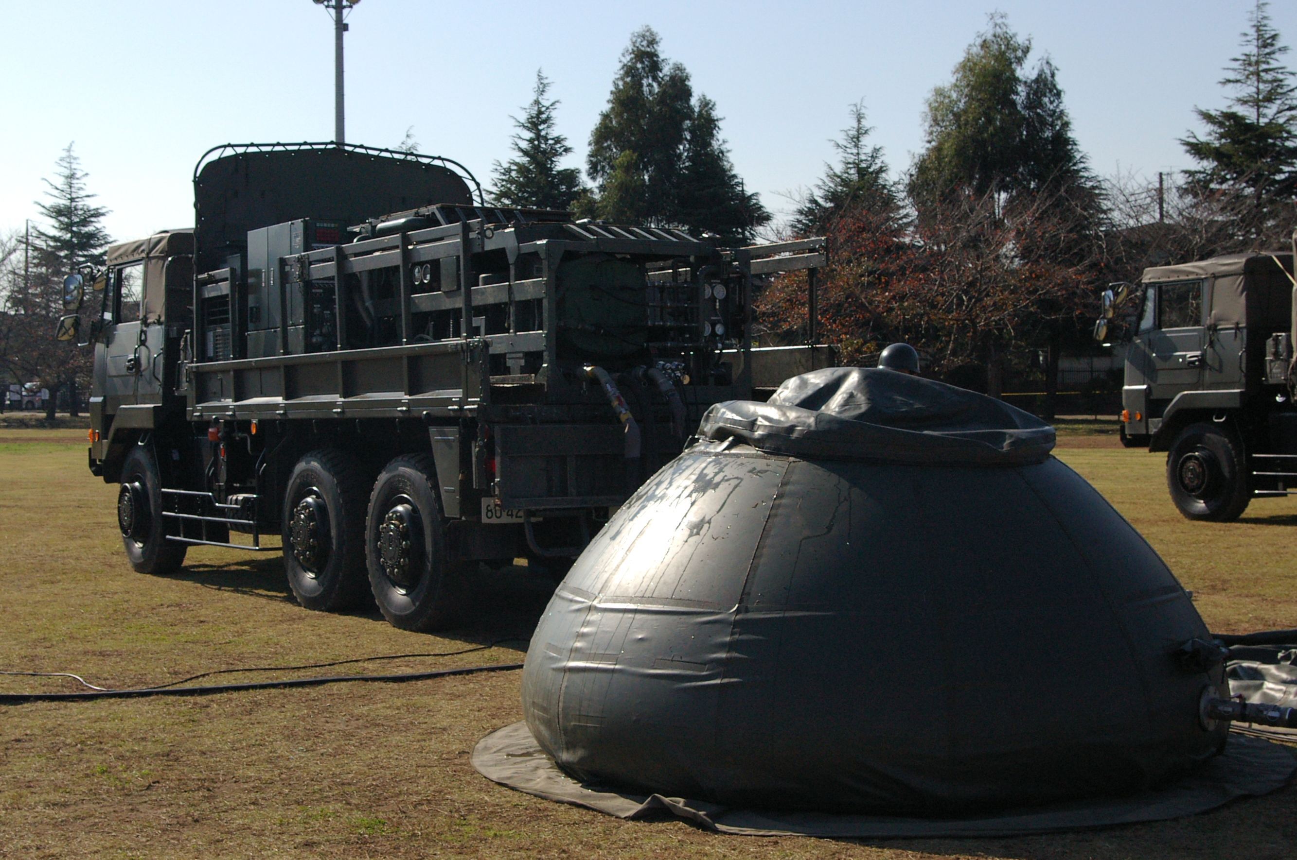 In Camp Matsudo,Japan. 浄水セット 逆浸透型 2007年11月18日、松戸駐屯地で撮影。